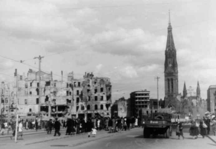 Berlin, Alexanderplatz, Georgenkirche Berlin, Alexanderplatz.- Ruinen zerstörter Gebäude, im Hintergrund St. Georgen-Kirche